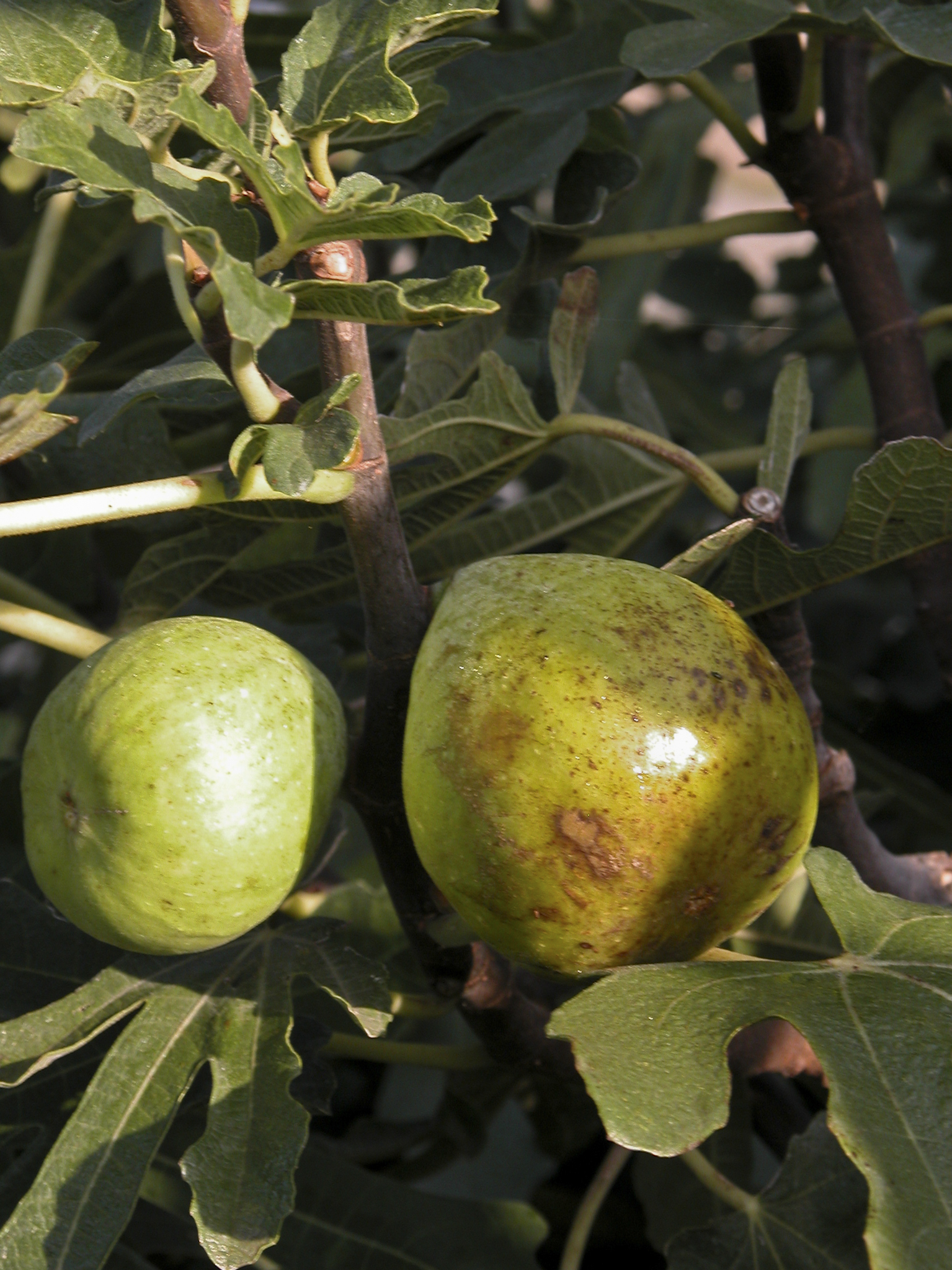 INRA, Jean Weber